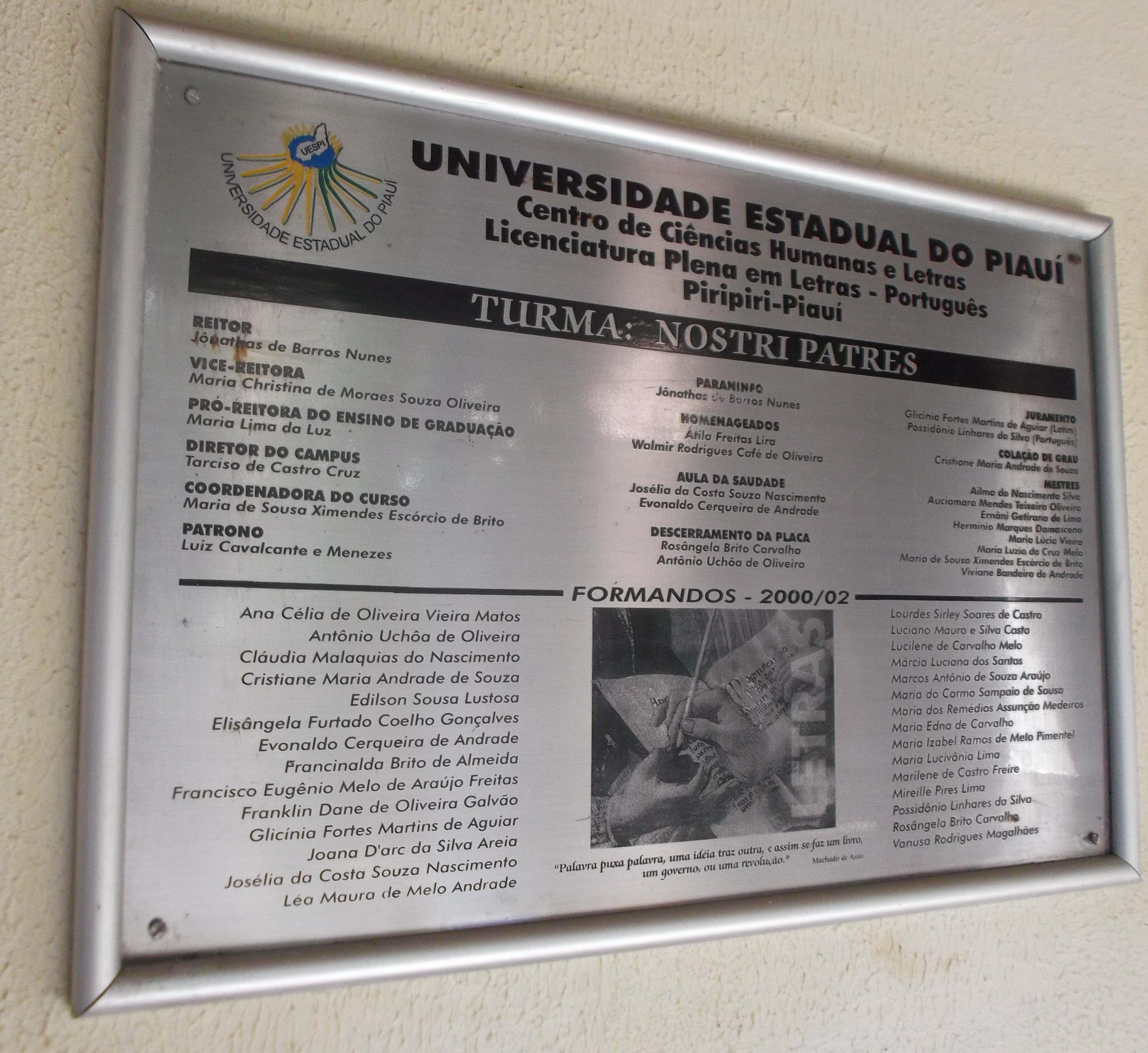 Placa de colação de grau em Letras Português no espaço público de placas na Universidades estadual do Piauí.